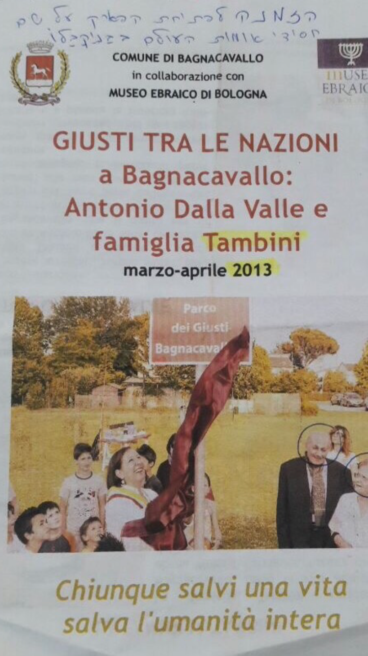 משפחת טמביני הייתה משפחה מהעיירה בניאקבלו, ממחוז רוונה באיטליה, שהסתירה והצילה יהודים בזמן מלחמת העולם השנייה. המשפחה כללה את האם אמליה (1876 - 2002), האב אורליו (ה-12 בדצמבר 1872 - ה-18 בנובמבר 1949), הבת רוזיטה והבן וינצ'נזו, שהיו בזמן השואה בשנות ה-20 לחייהם. כל בני משפחת טמביני הוכרו כחסידי אומות עולם בשנת 1974 על הצלת תשעה מבני משפחת וייס, גלנדאור ויעקובוביץ. בתמונה ניתן לראות הזמנה לפתיחת פארק לזכר בני משפחת טמביני.